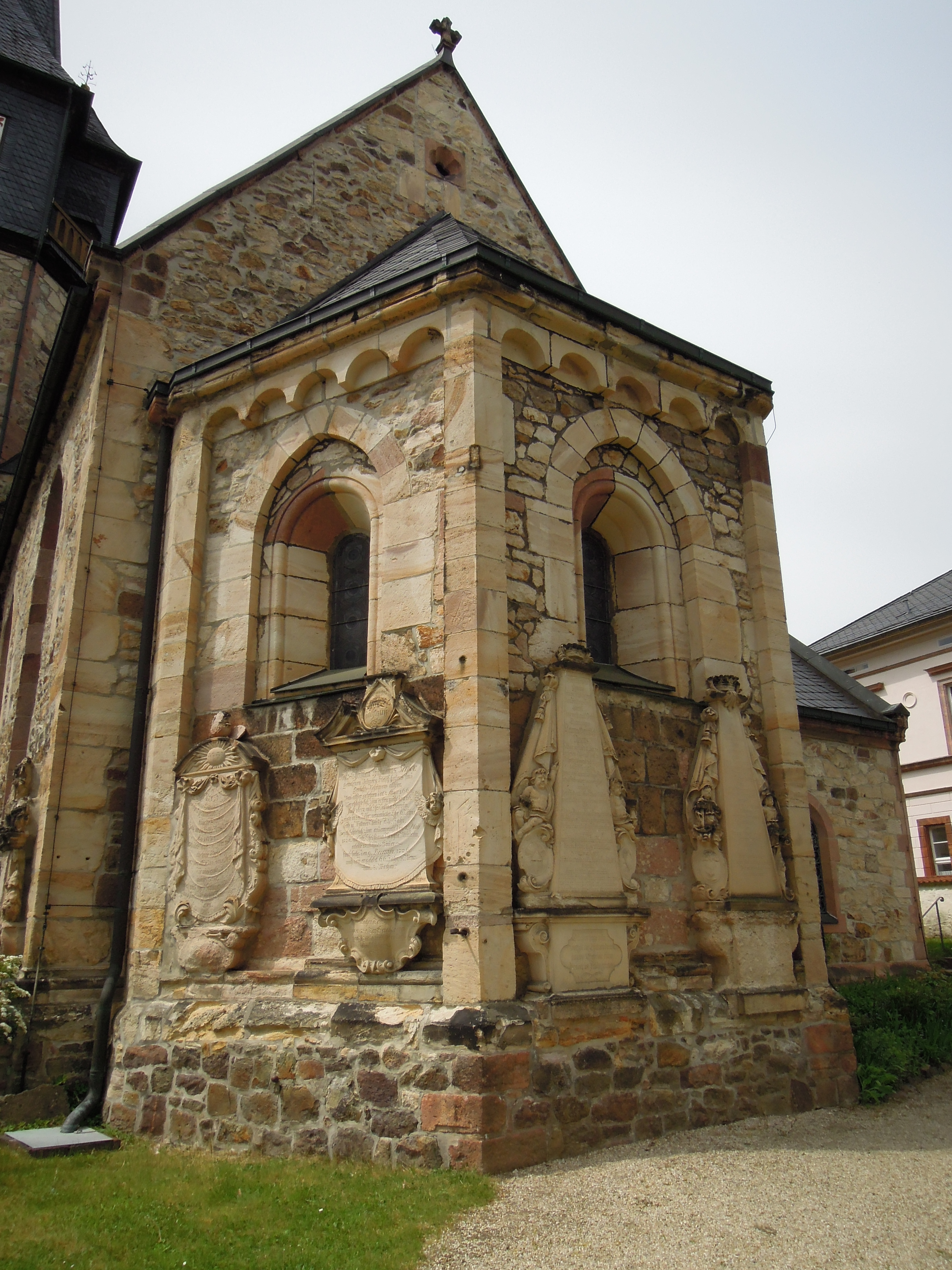 Kohrener Sankt-Gangolf-Kirche Außen Chor von Südost 2015